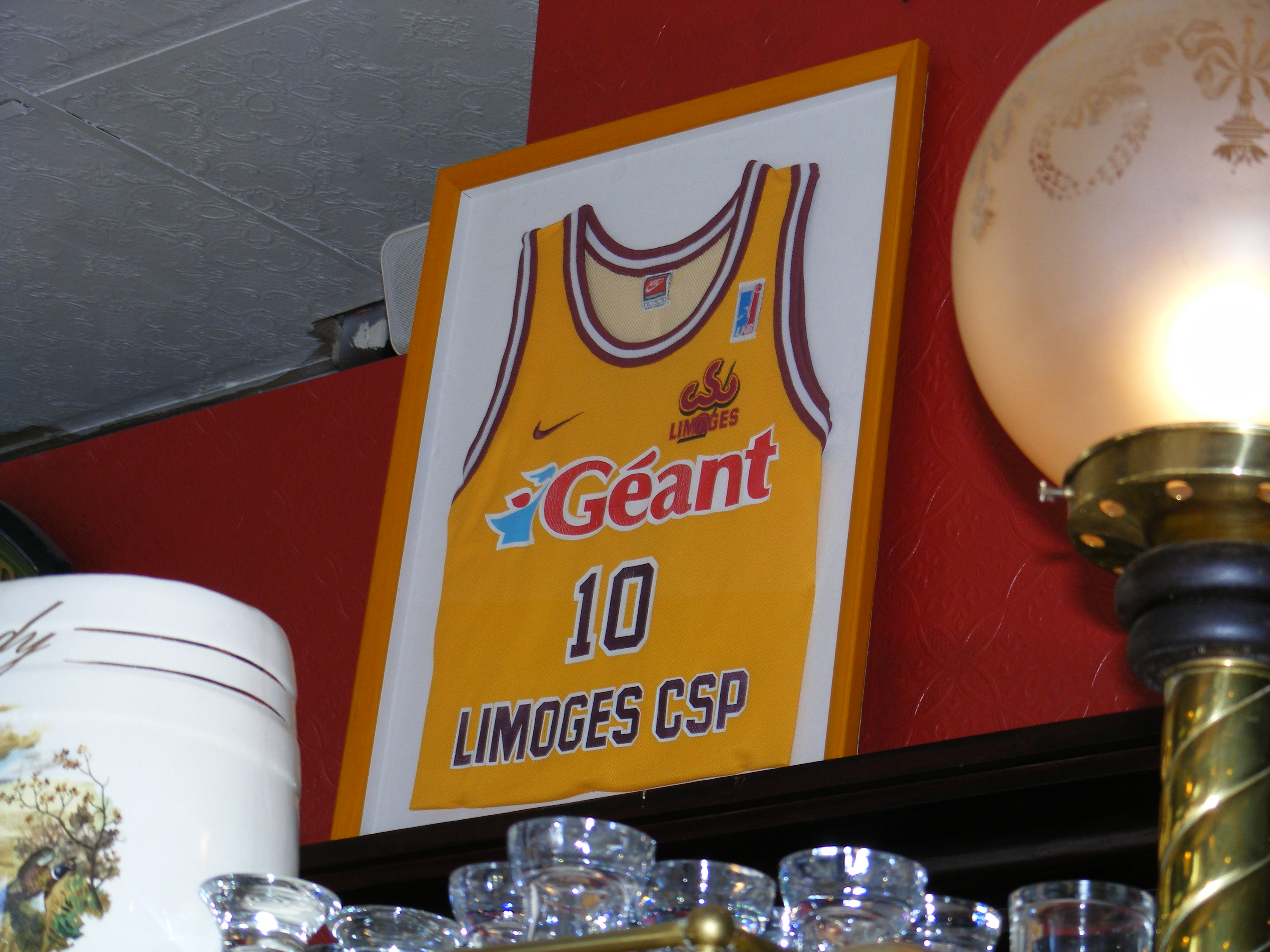 Maillot jaune orangé du Limoges CSP